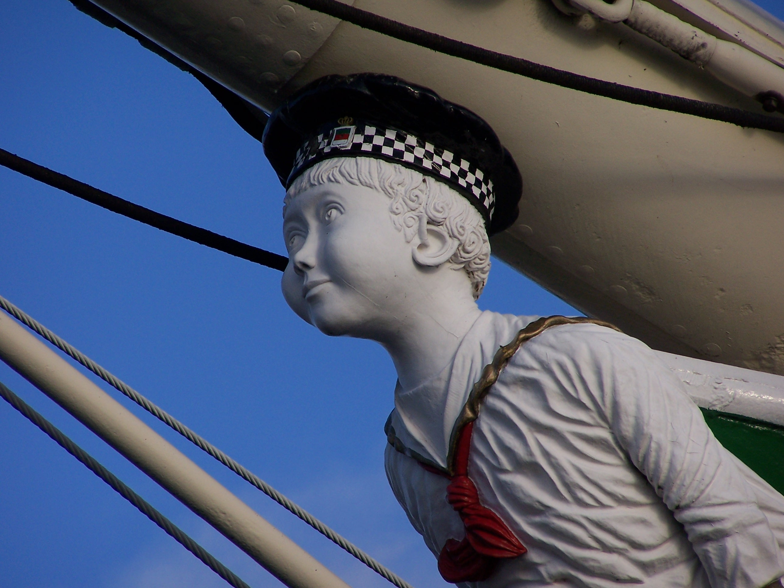 Galionsfigur der Rickmer Rickmers, Hamburg